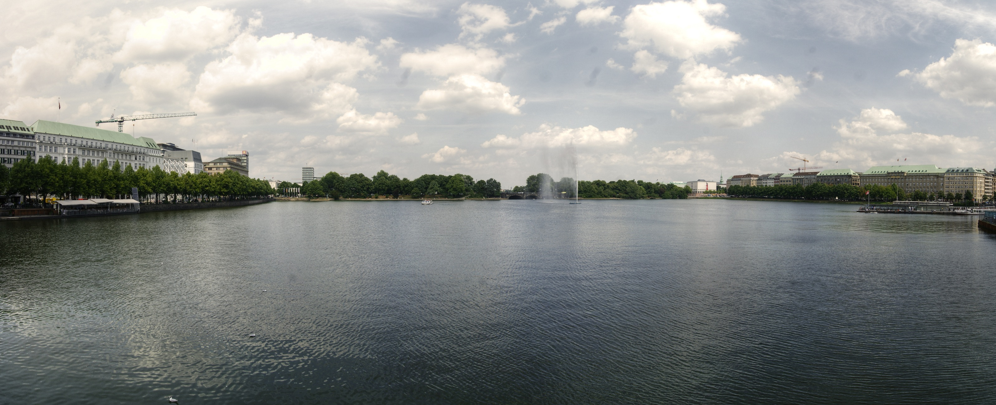 Binnenalster in Hamburg